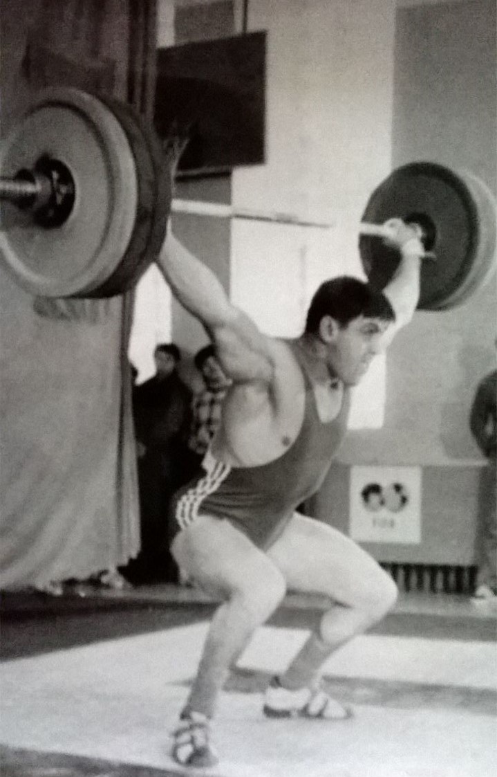 Рывок 155 кг